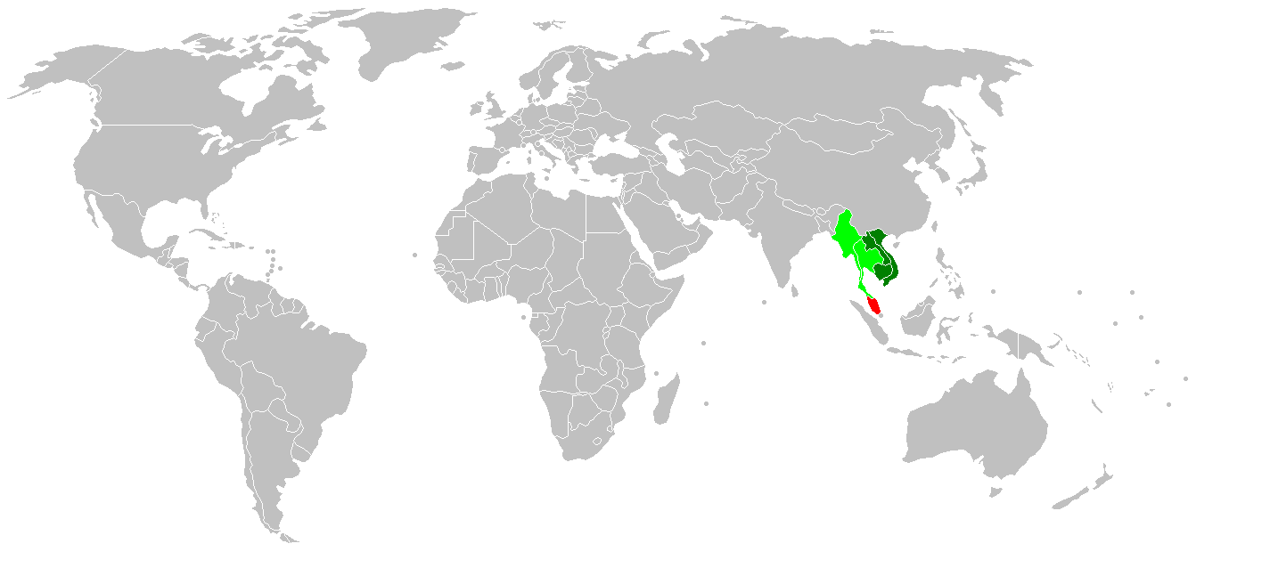 Země Indočíny